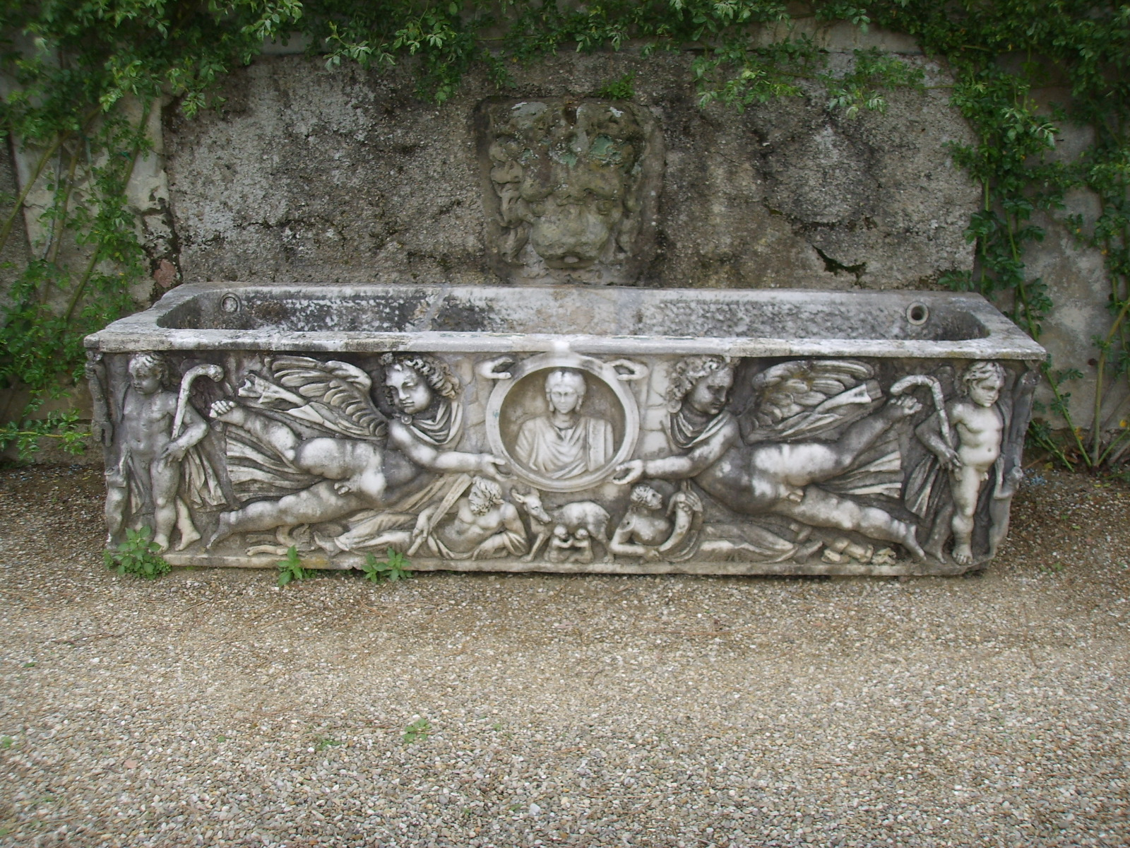 Villa la pietra, giardino est, rotonda, sarcofago